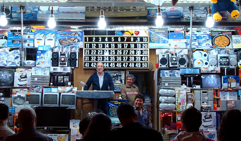 tom tom tómbola...